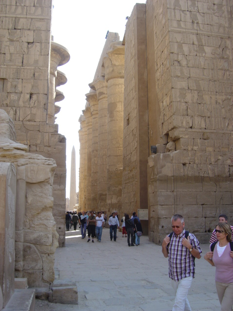 Eigen foto Ben Pirard januari 2007 Karnak